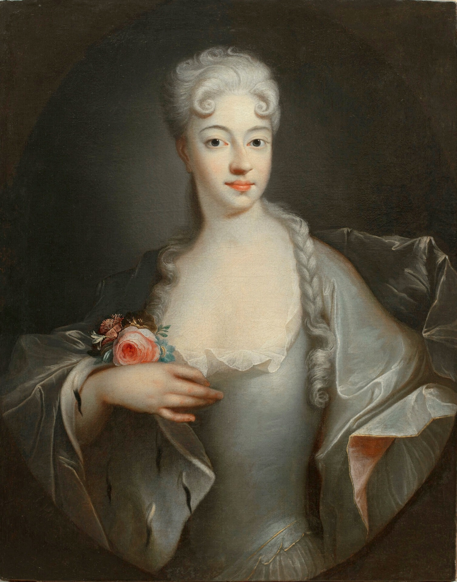 Eleonora z Waldsteinow Czartoryska